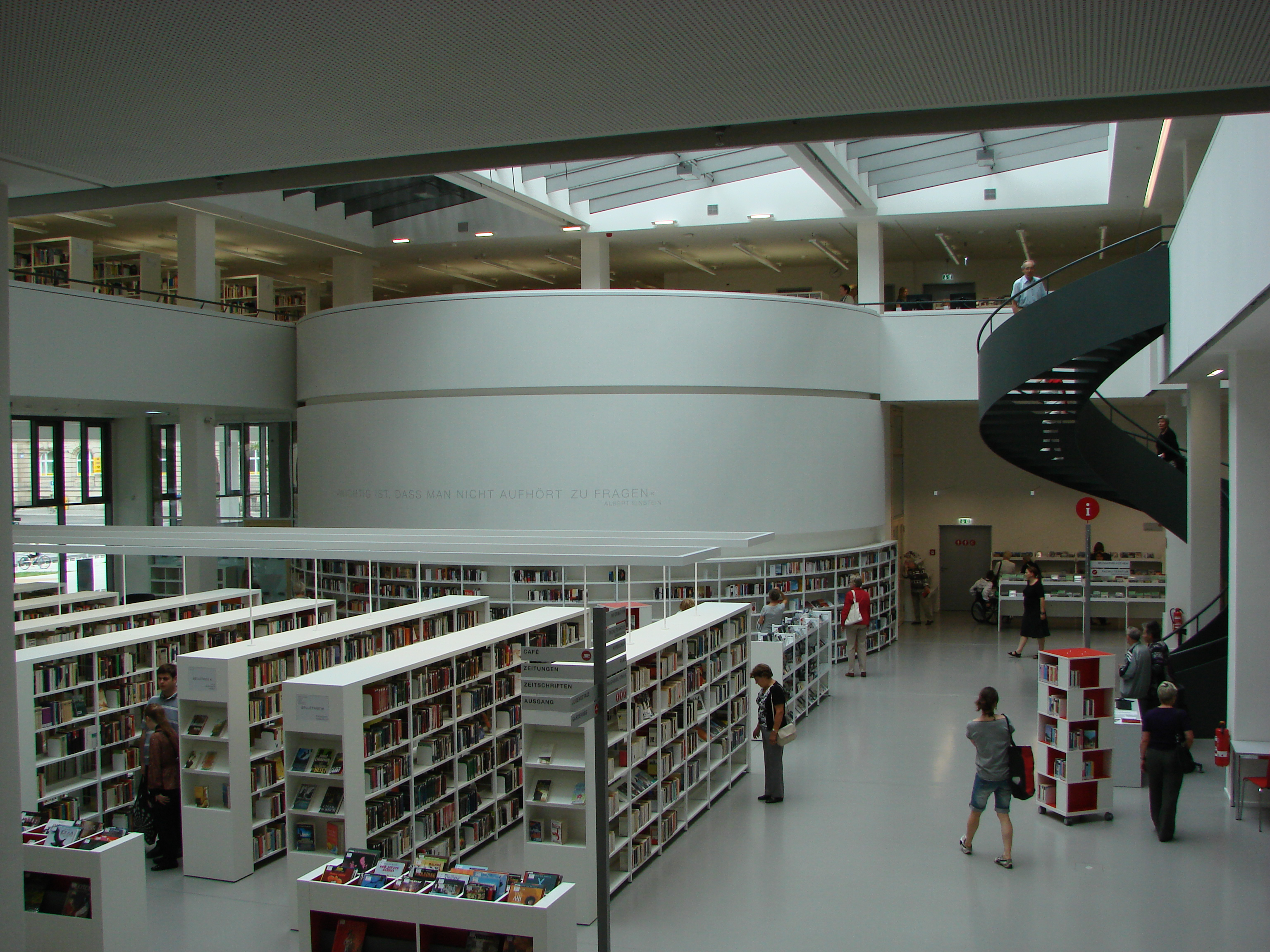 Freihandausleihe der Stadt- und Landesbibliothek Potsdam im Erdgeschoss am Tag der Neueröffnung, d. 13. September 2013